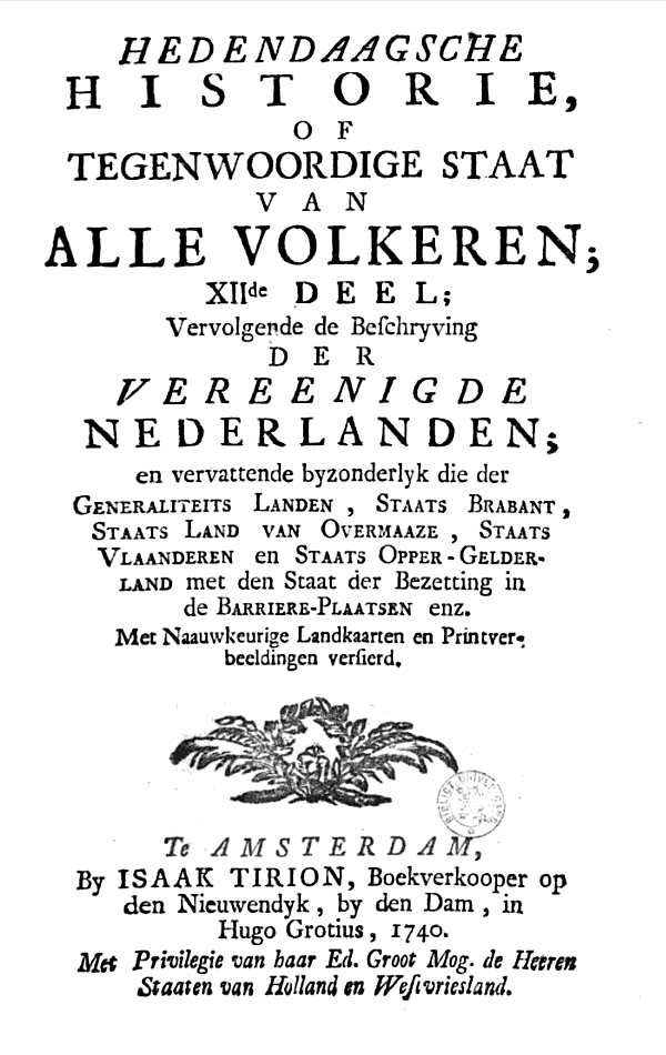 Hedendaagsche historie of tegenwoordige staat van Alle Volkeren, Vervolgende de Beschryvinge der Vereenigde Nederlanden....Te Amsterdam By Isaak Tirion, Boekverkoper, op den Nieuwendyk, by den Dam, in Hugo Grotius, 1740. Met Privilegie van hunne Ed. Groot Mog. de Heeren Staaten van Holland en Westvriesland.